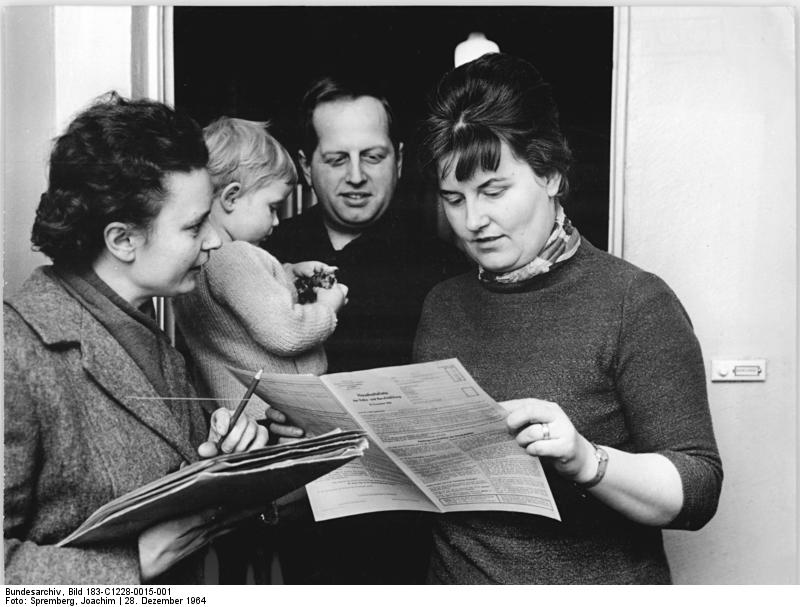 Berlin, Volkszählung Zentralbild Spremberg Kri-Bö. 28.12.1964 Haushaltslisten werden ausgegeben Seit dem 28.Dezember 1964 sind freiwillige Helfer unterwegs, um die Haushaltslisten zu verteilen und wenn notwendig, Erläuterungen zu geben. Unser Reporter fotografierte die Helferin Frau Helga Pebelski (links), wie sie eine Liste ausgibt und der Familie Schellhase in Berlin-Friedrichsfelde die Beantwortung der Fragen erklärt.